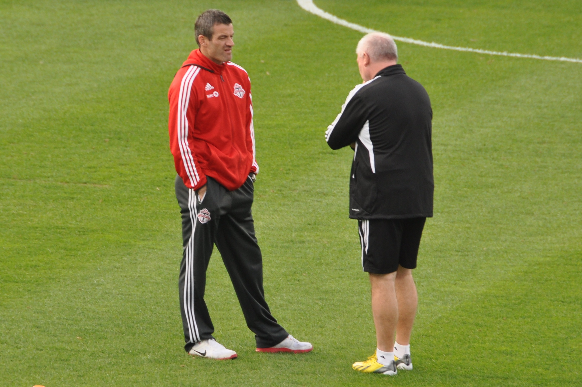 de la démie-finale du championnat canadien Amway au stade Saputo